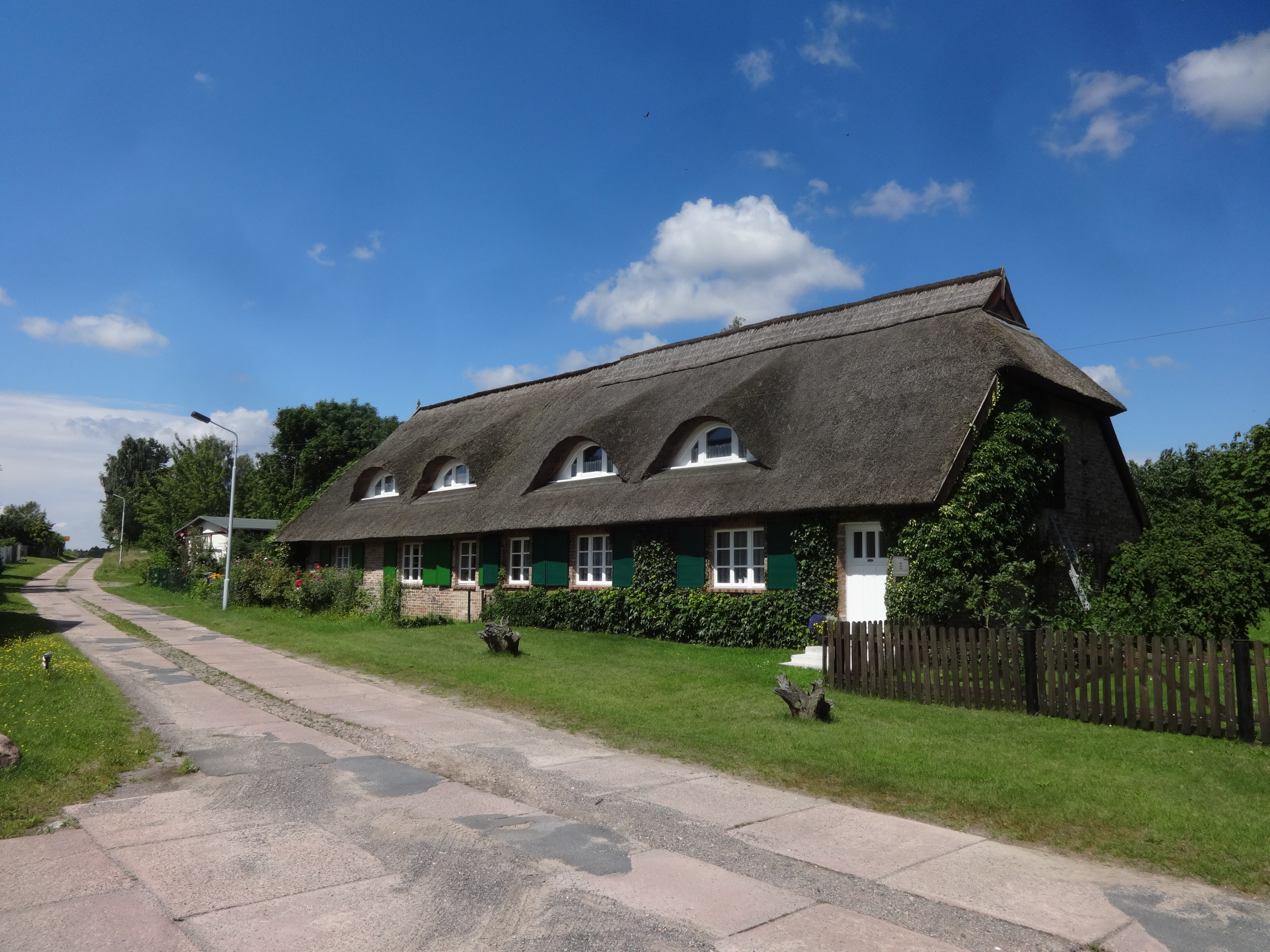 Dorfstraße in Klotzow, Gemeinde Buggenhagen im Landkreis Vorpommern-Greifswald